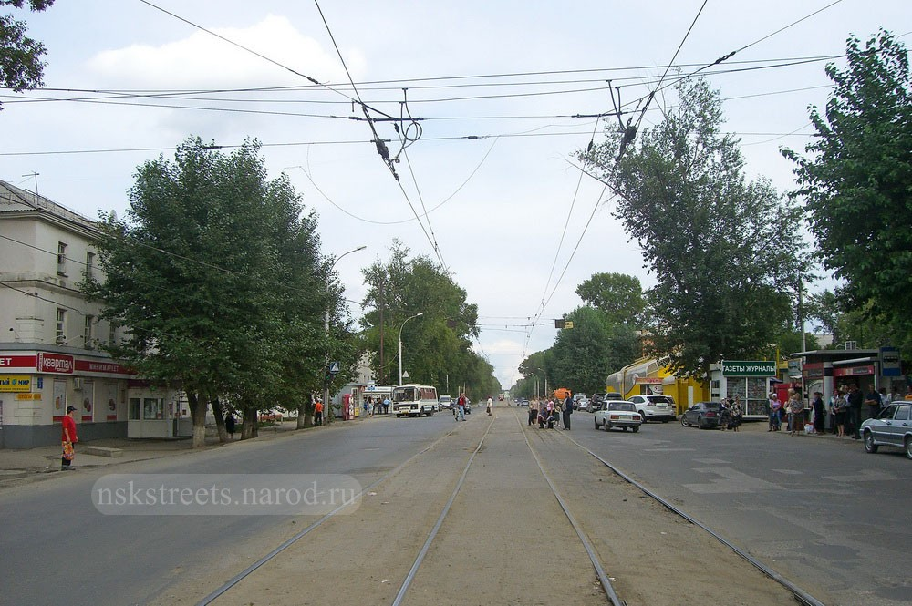 Улица Мира, Новосибирск